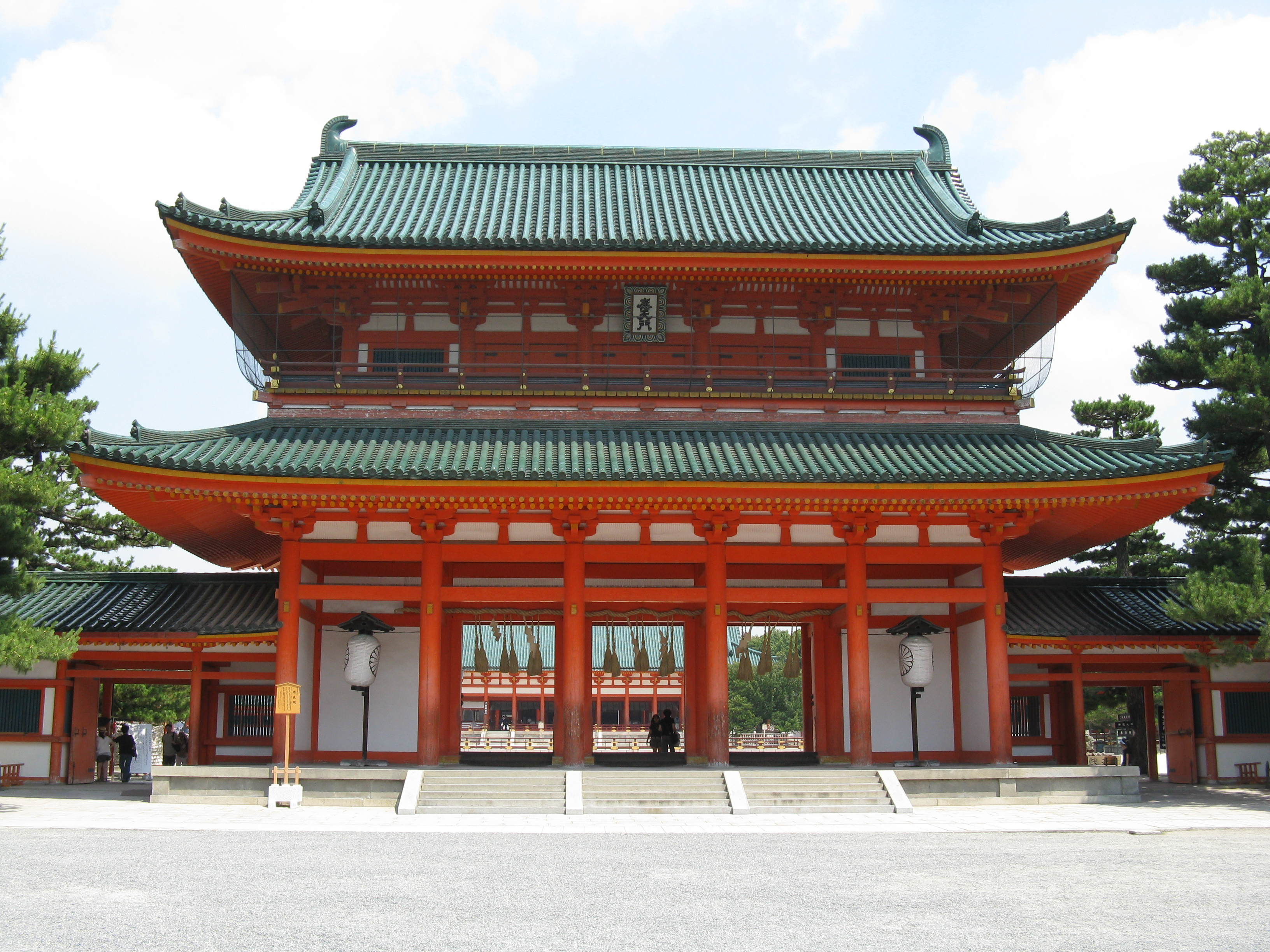 平安神宮 應天門